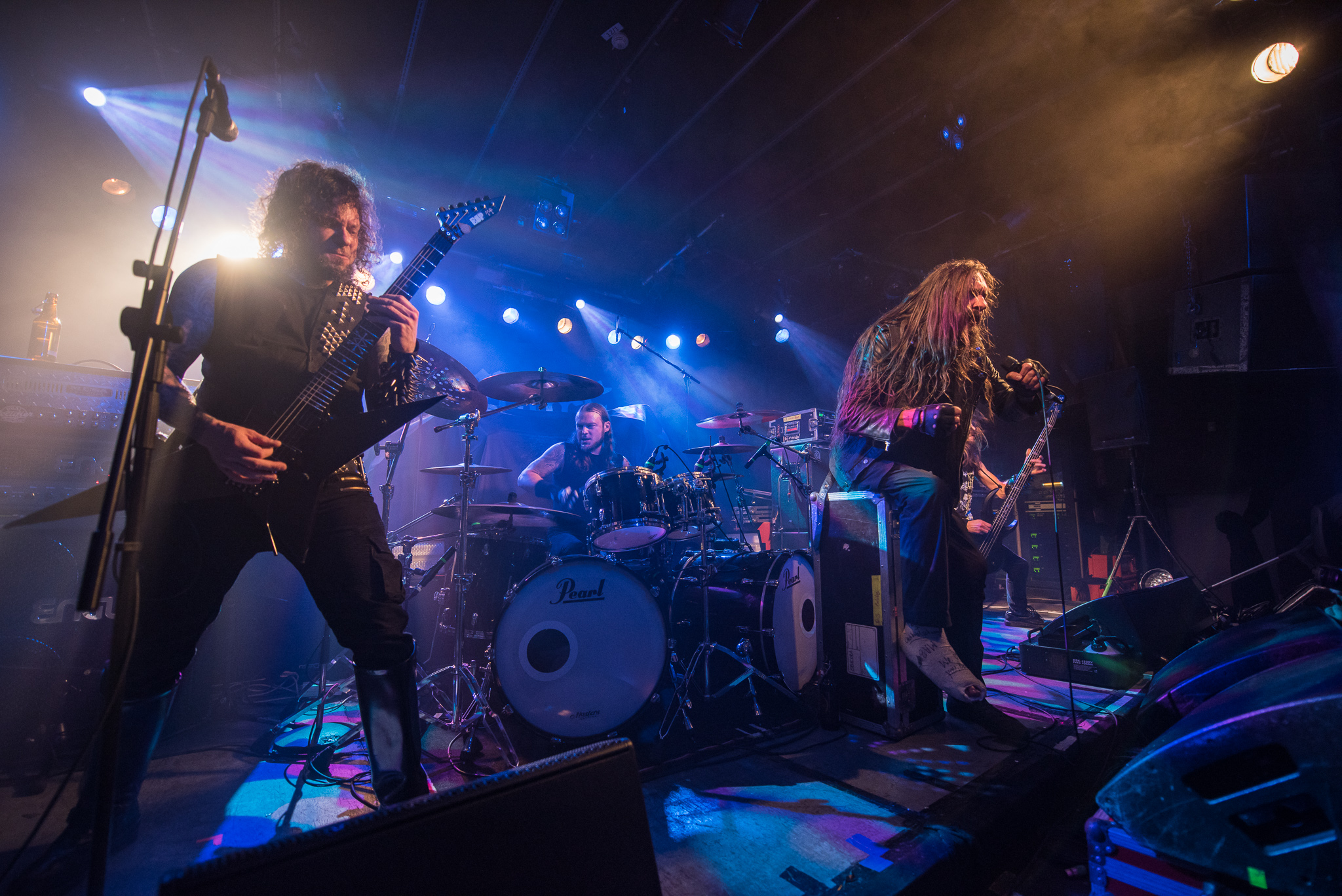 Concertbüro Franken,Der Hirsch,Goatwhore,Konzert,Livekonzert,Livemusik,Louis Benjamin Falgoust,Sammy Duet,Zack Simmons